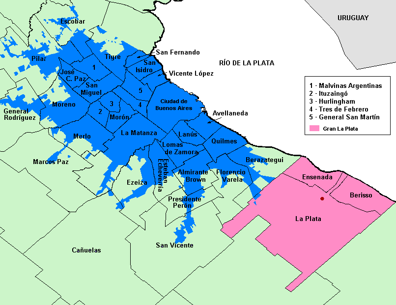 Aglomerado Gran Buenos Aires. Fuente de datos: INDEC